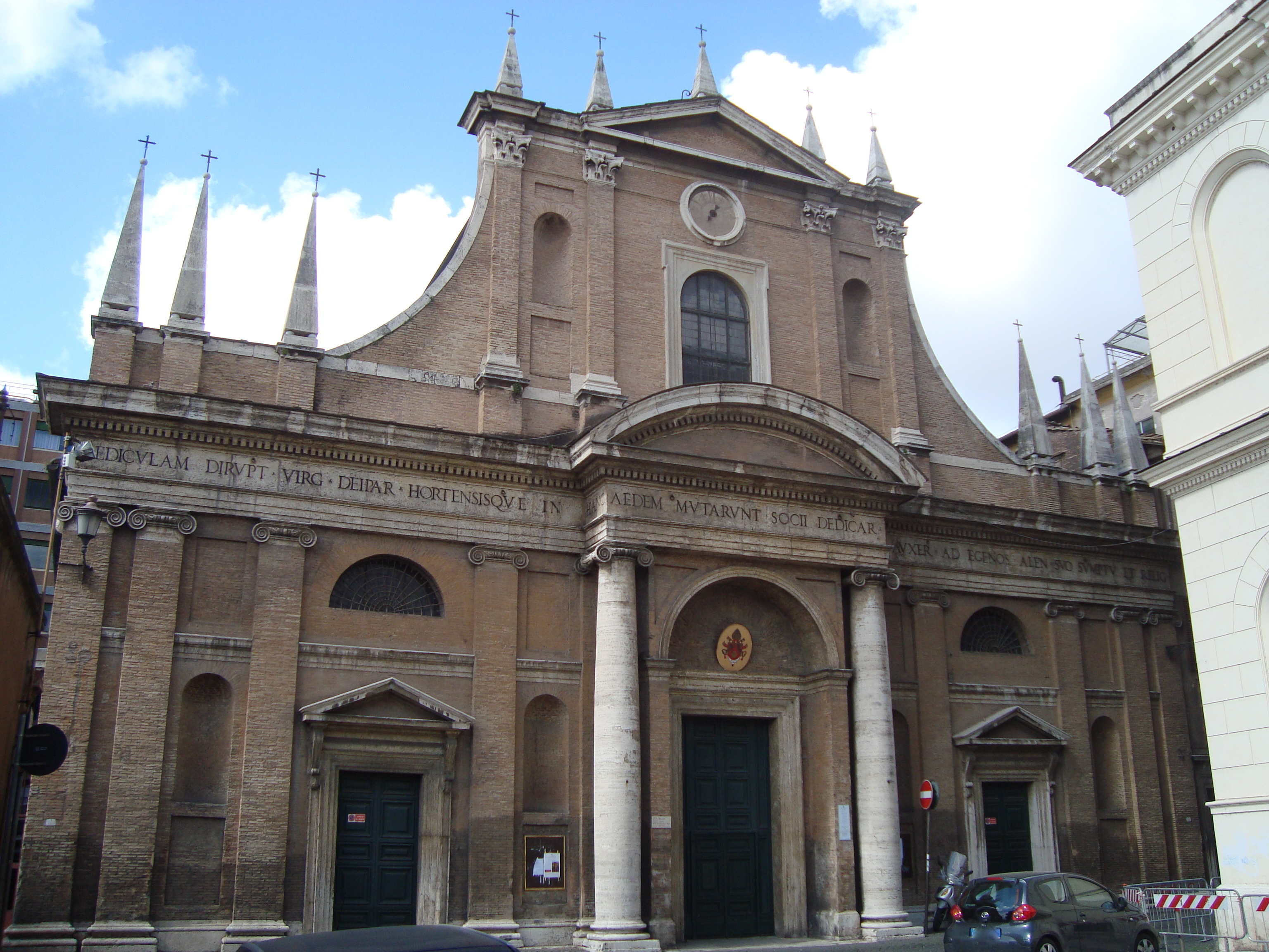 Eglise Santa Maria dell'Orto à Trastevere, Rome